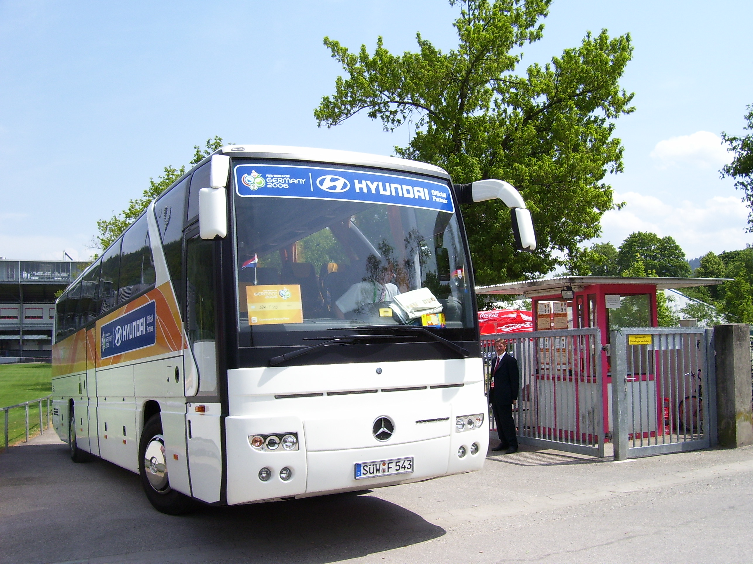 Touringcar NL elftal bij het stadion van SC Freiburg